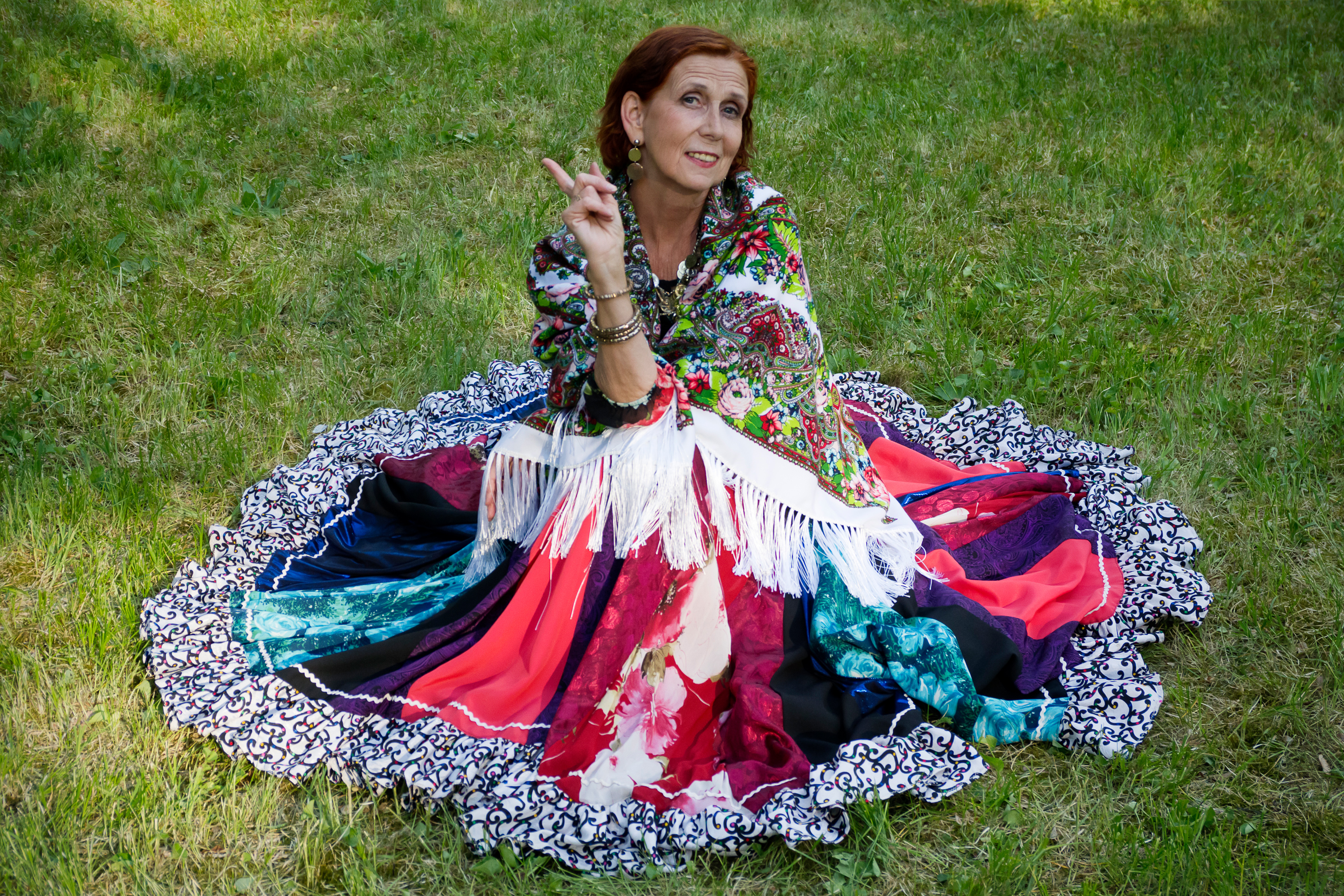 Lehti Kostabi mustlastantsuansambel Maljarka 10. sünnipäeva kontserdil Tartus